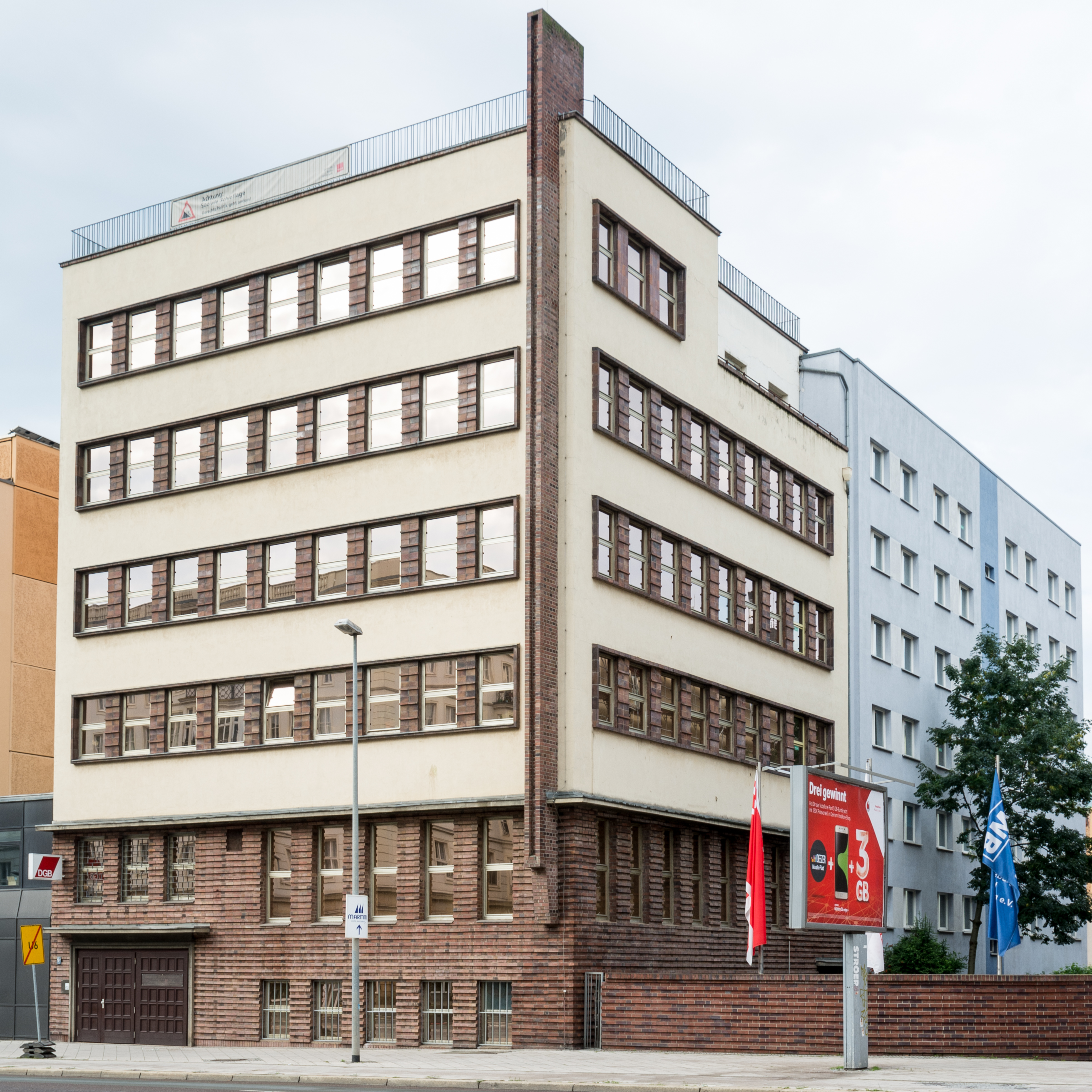 Haus der Gewerkschaften, Otto-von-Guericke-Straße 6 in Magdeburg-Altstadt. This is a photograph of an architectural monument.It is on the list of cultural monuments of Magdeburg